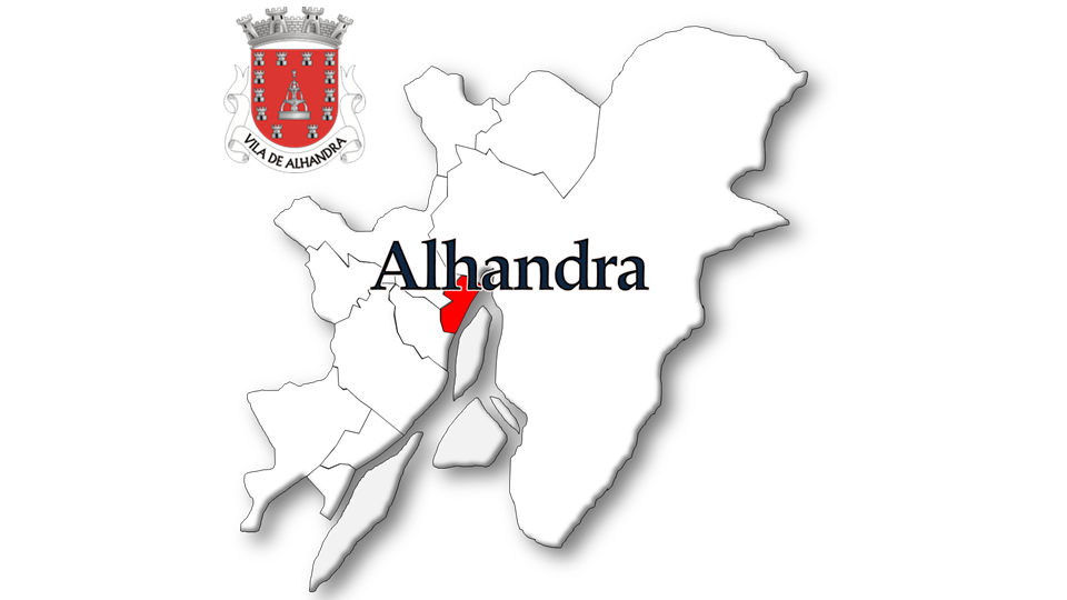 Evolução da População